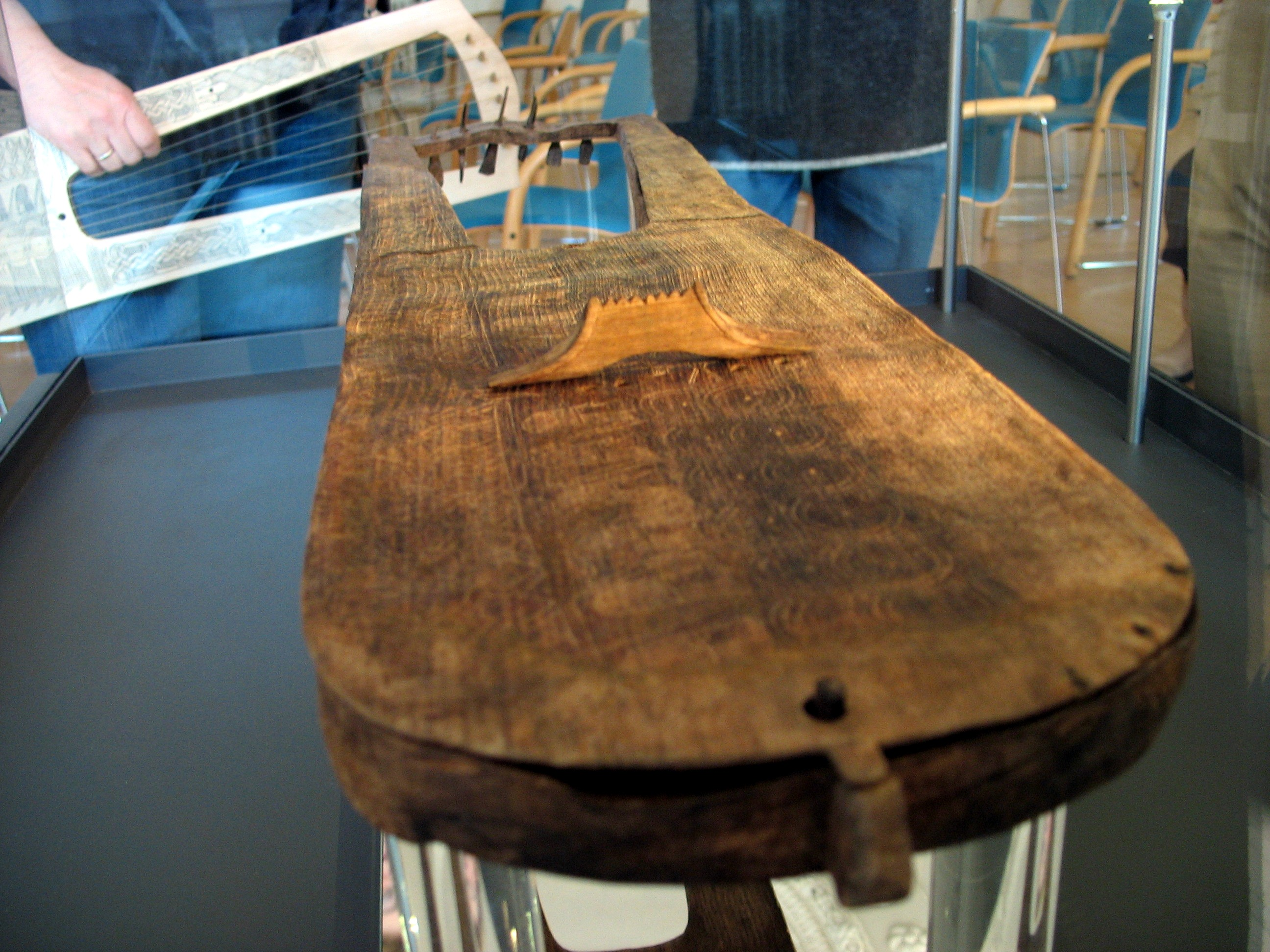 Description: Originalfund einer Leier, die als Grabbeigabe in einer alemannischen Grabstätte bei Trossingen gefunden wurde. Datierung der Grabstätte: 580 n. Chr. Archäologisches Landesmuseum Konstanz. Photographer: User:Opodeldok